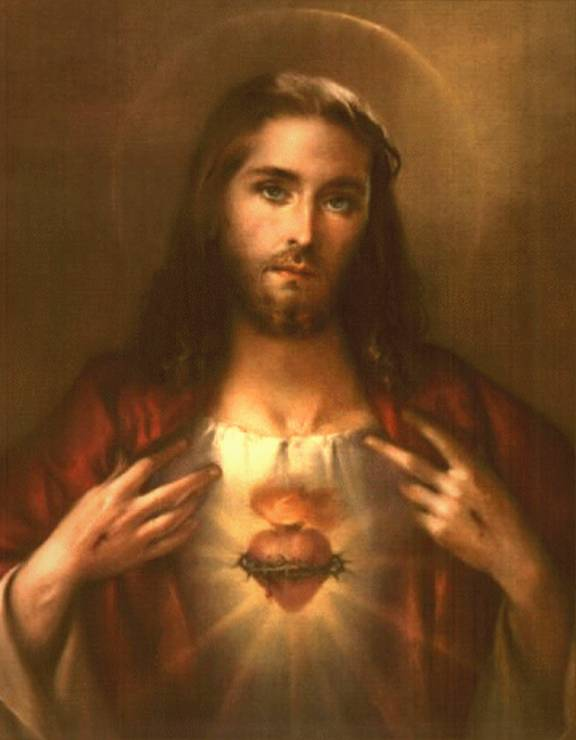 Сердце Иисуса